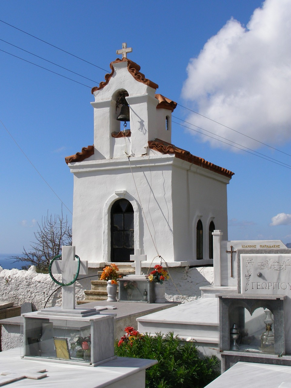 Beinhaus des Friedhofs von Asomatos / Kreta